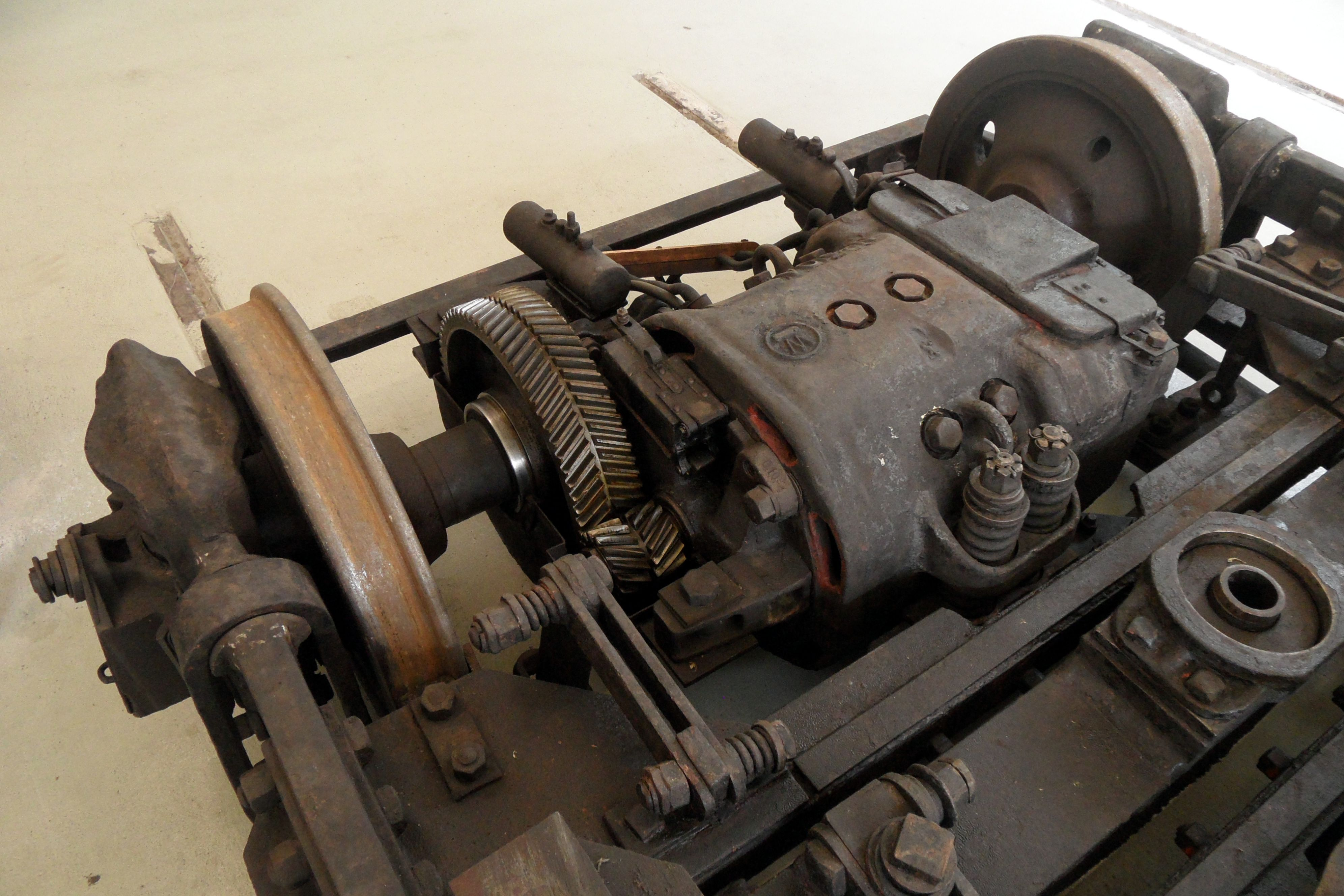 Der Achsantrieb ist für einen geräuscharmen Lauf pfeilverhahnt, diese Pfeilverzahnung vermeidet gleichzeitig störende und wirkungsgradveringernde axiale Kräfte auf Motorwelle und Tatzlager.